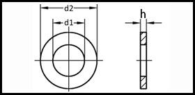 ISO 7092